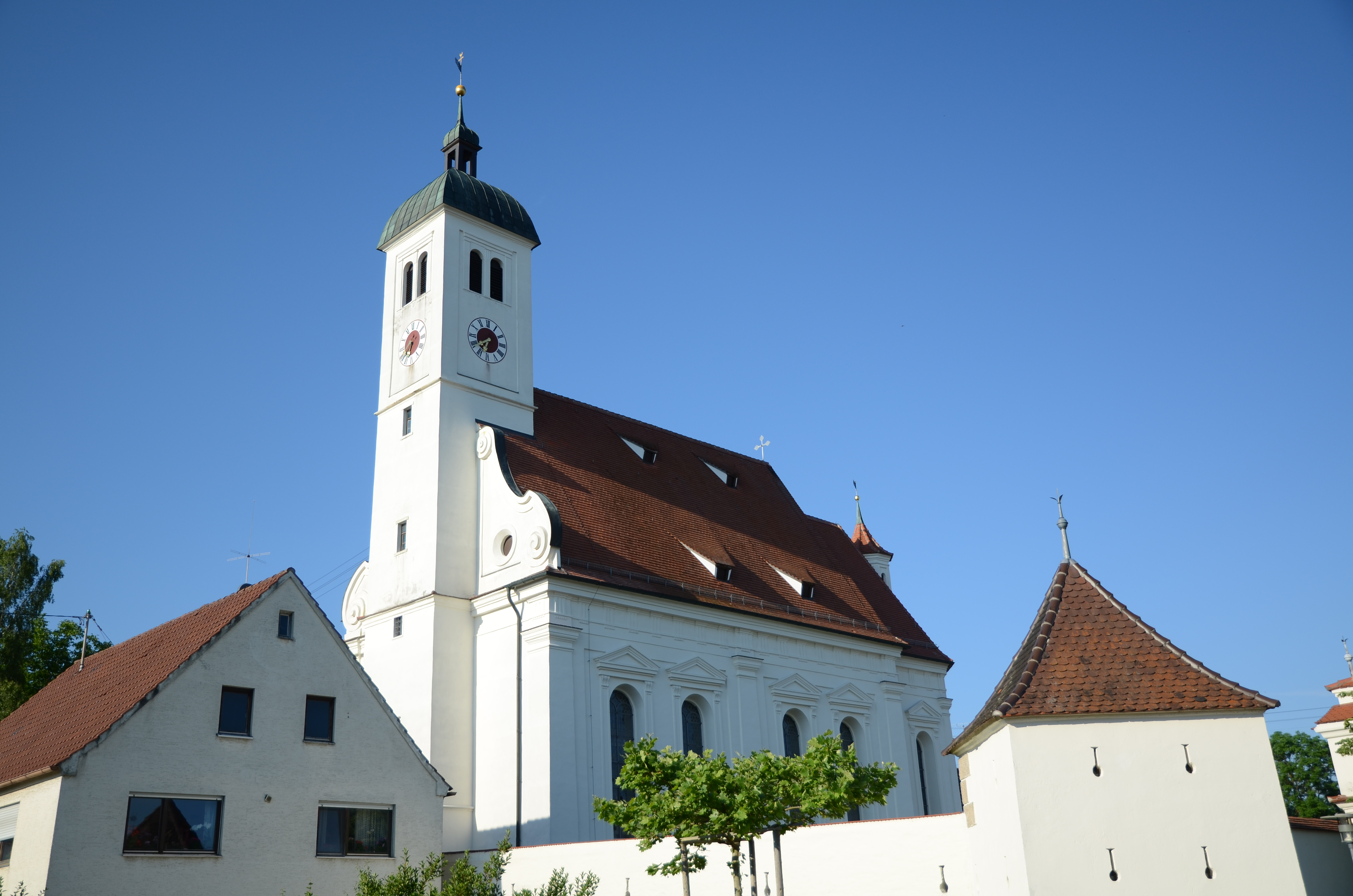 evang.-luth. Dreifaltigkeitskirche in Haunsheim